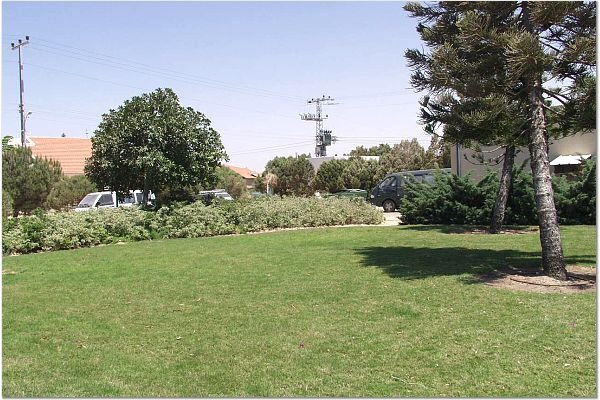 בני עצמון התמונות באדיבות קטיף.נט (קישור) אתר האינטרנט של גוש קטיף. צילם: מוטי סנדר.